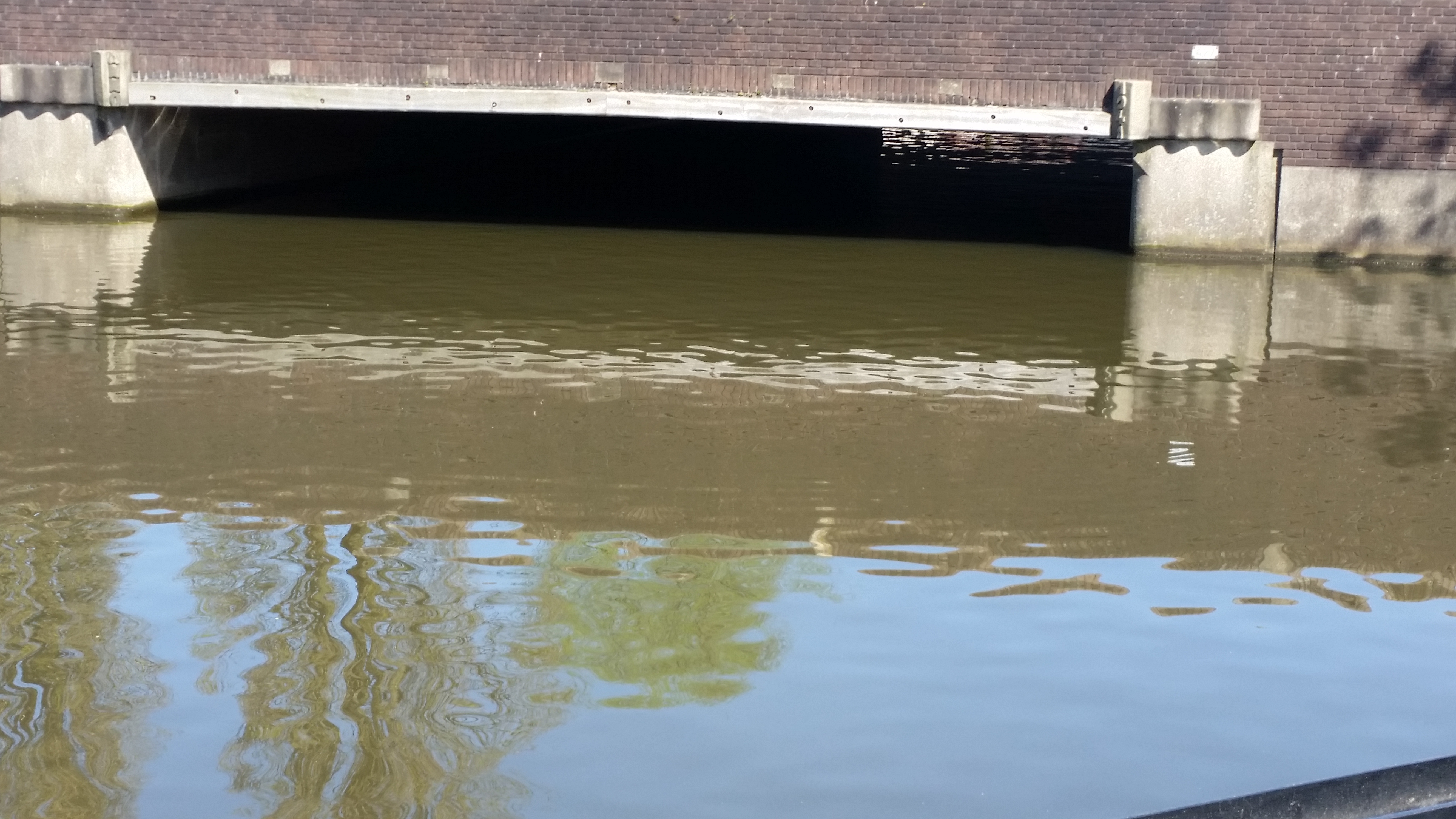 Jaarstenen van brug 427 ïn de Wibautstraat over de Ringvaart Watergraafsmeer